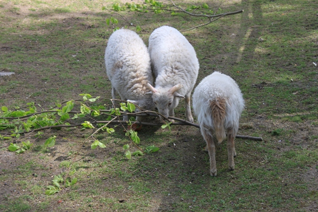 Owca bretońska, Poznań Stare Zoo